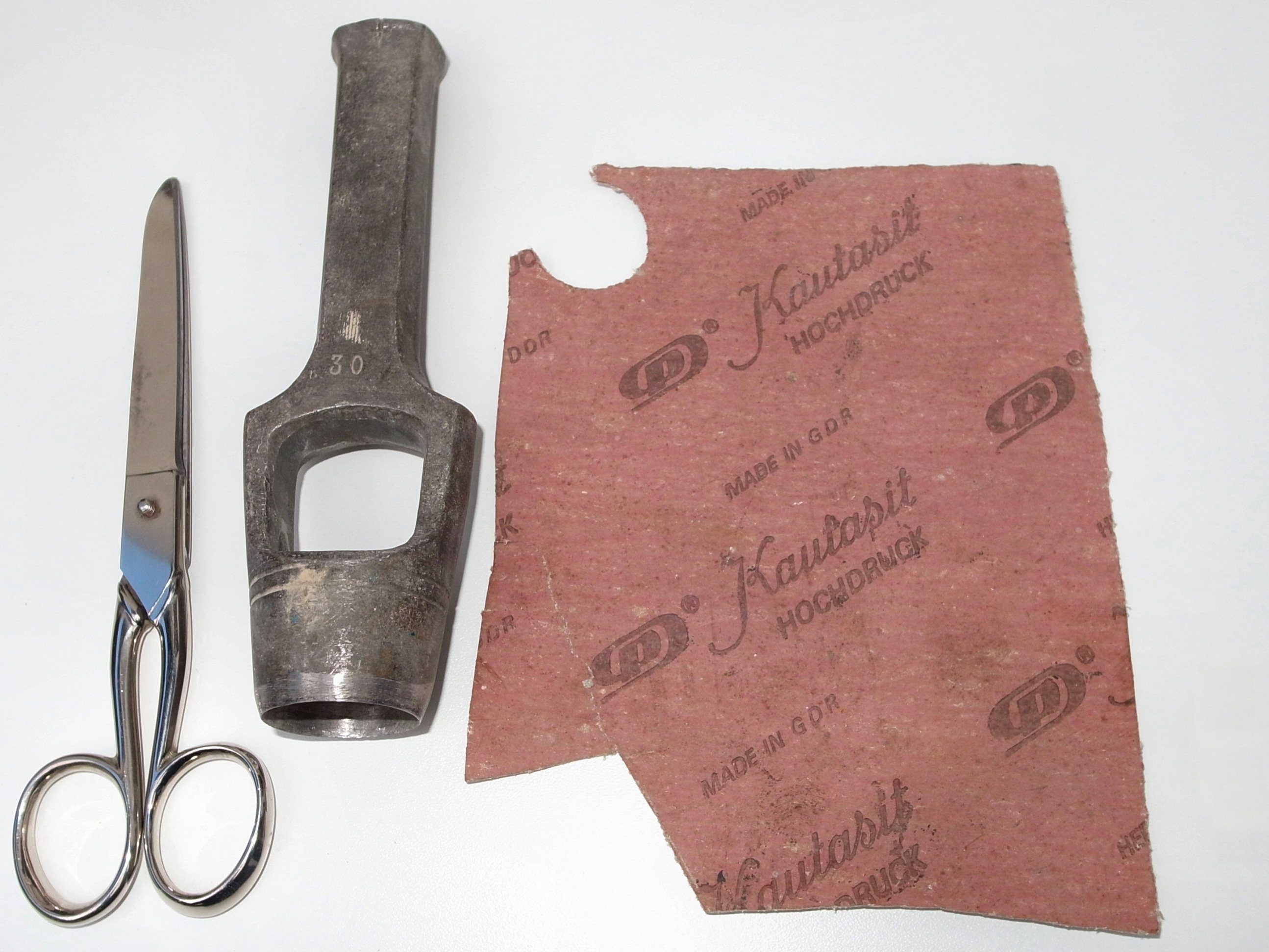 Kautasit: 0,5 mm starkes Dichtungsmaterial